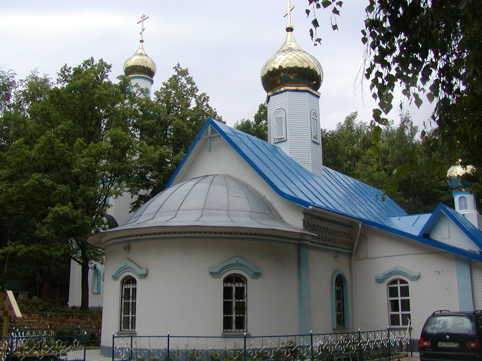 Храм в честь Святителя Тихона, Патриарха Московского и Всероссийского на Кончаловском кладбище в Обнинске. Общий вид.